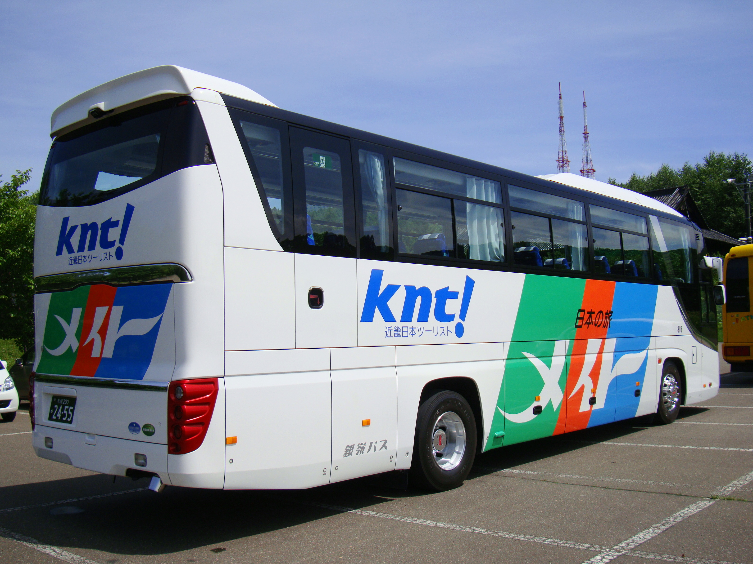 Kinki Nippon Tourist